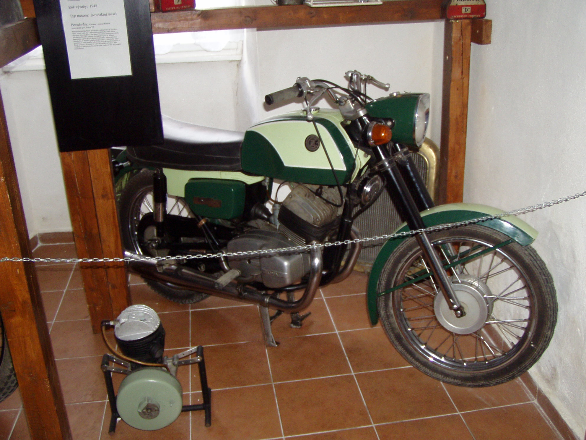 ČZ 250 typ 471 (1975)